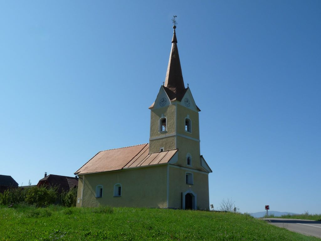 Sveti Peter v Koritnici